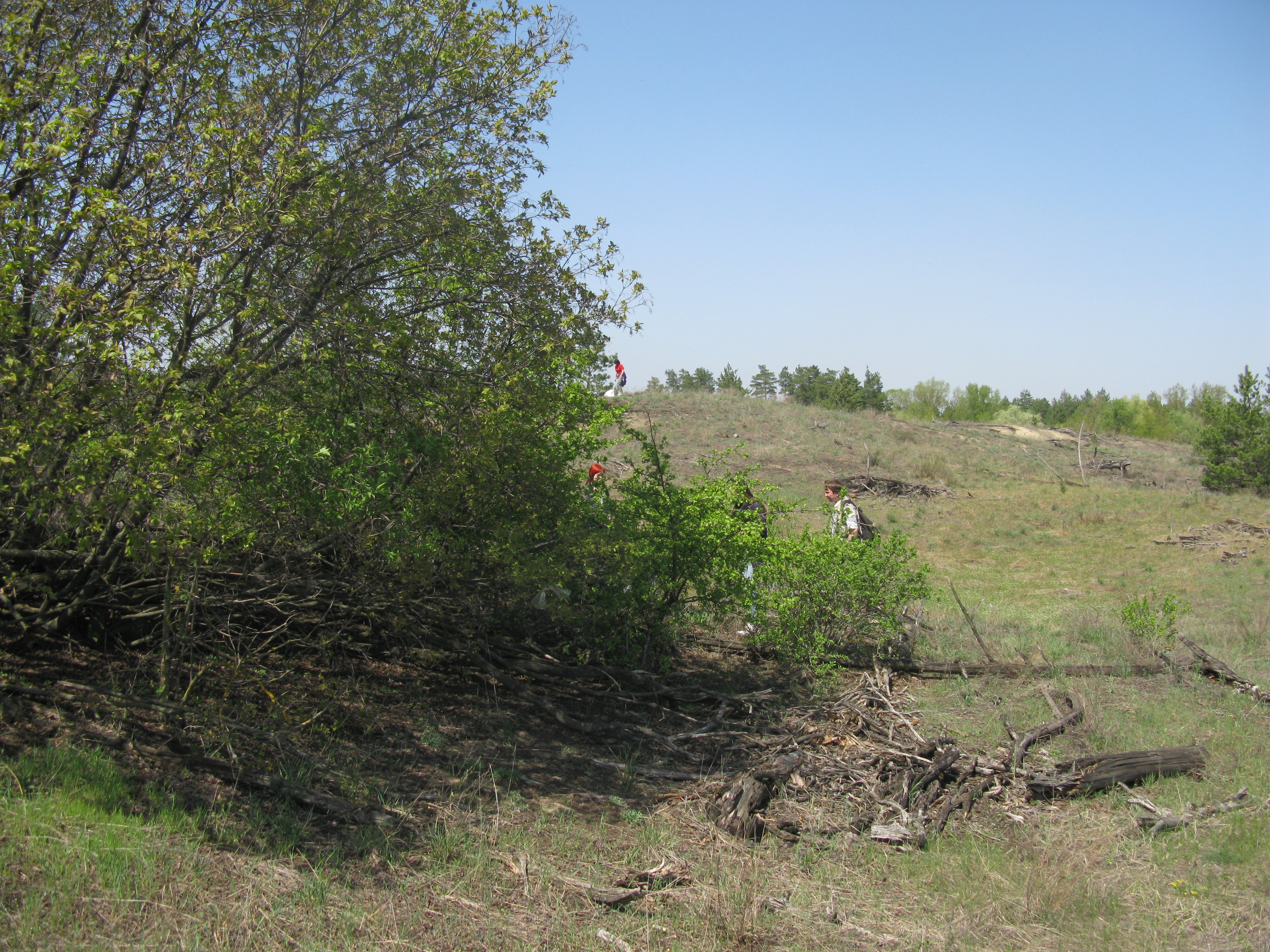 Арена р. Дніпро у межах природного заповіднику "Дніпровсько-Орільський"